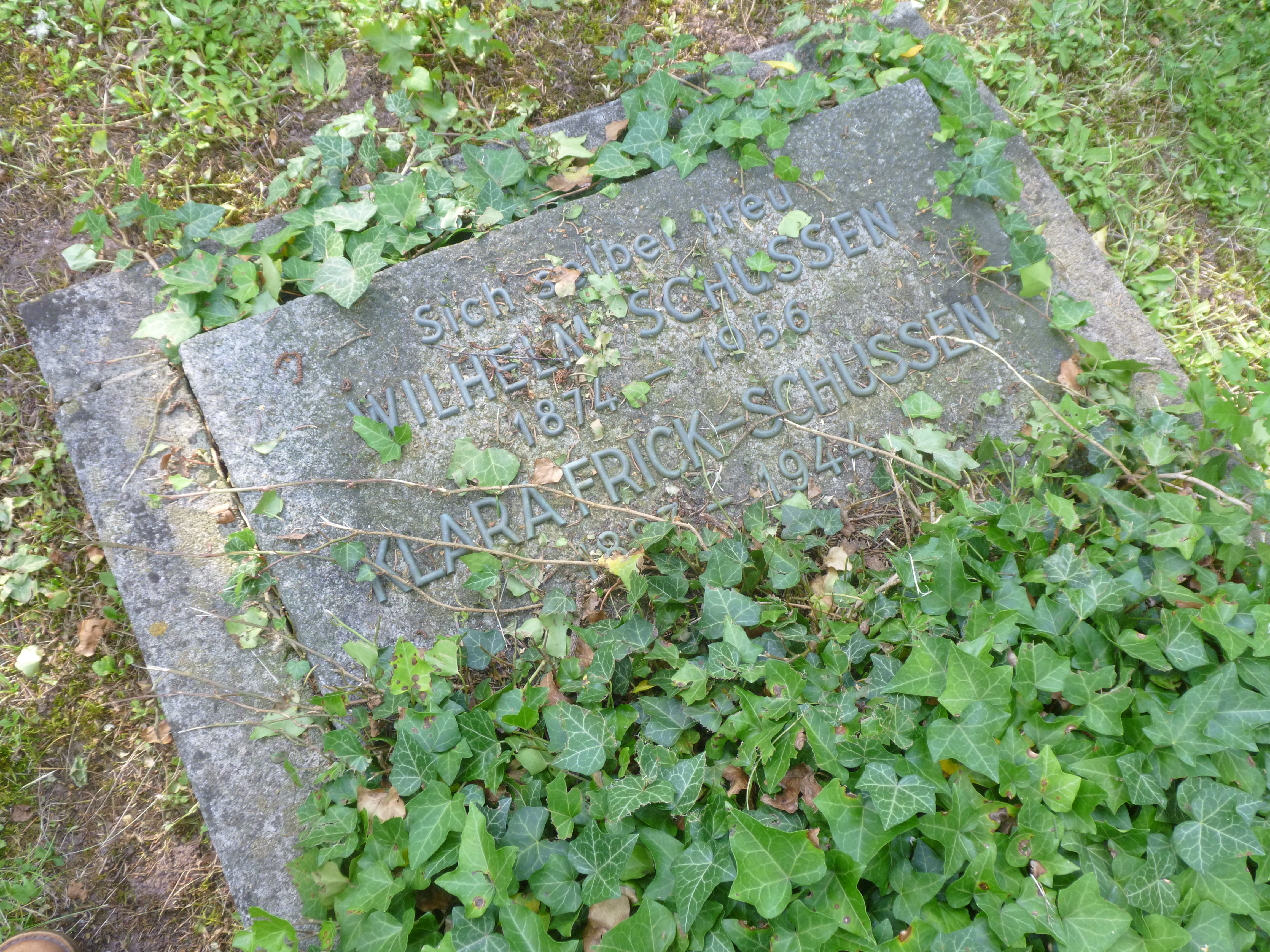 Wilhelm Schussen Stadtfriedhof Tübingen